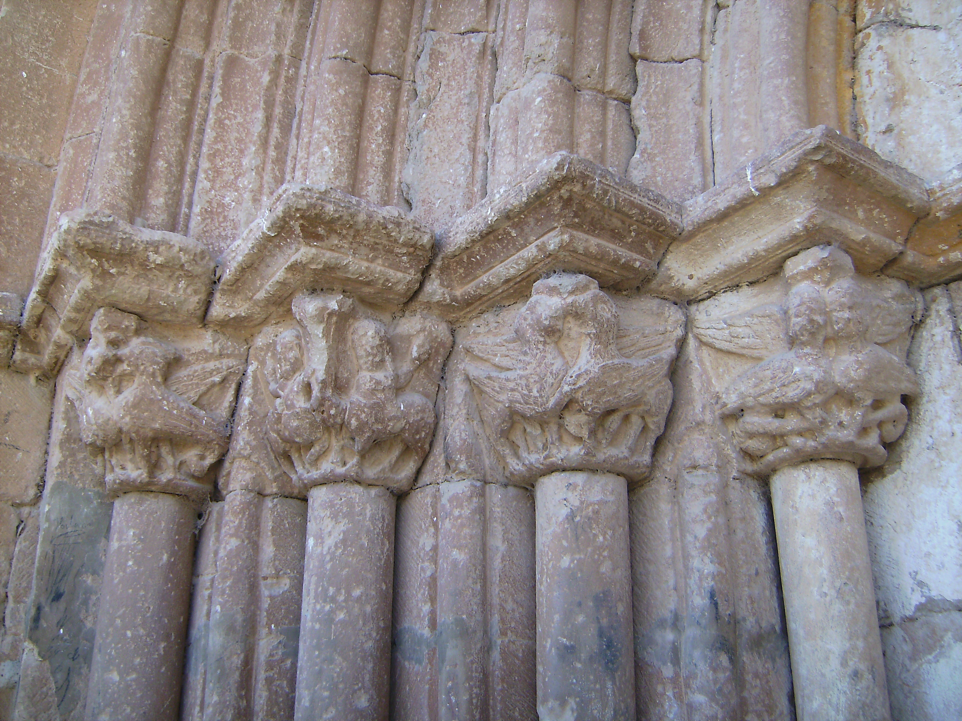 Millana - Iglesia de Santo Domingo de Silos (Capiteles Izquierdos)